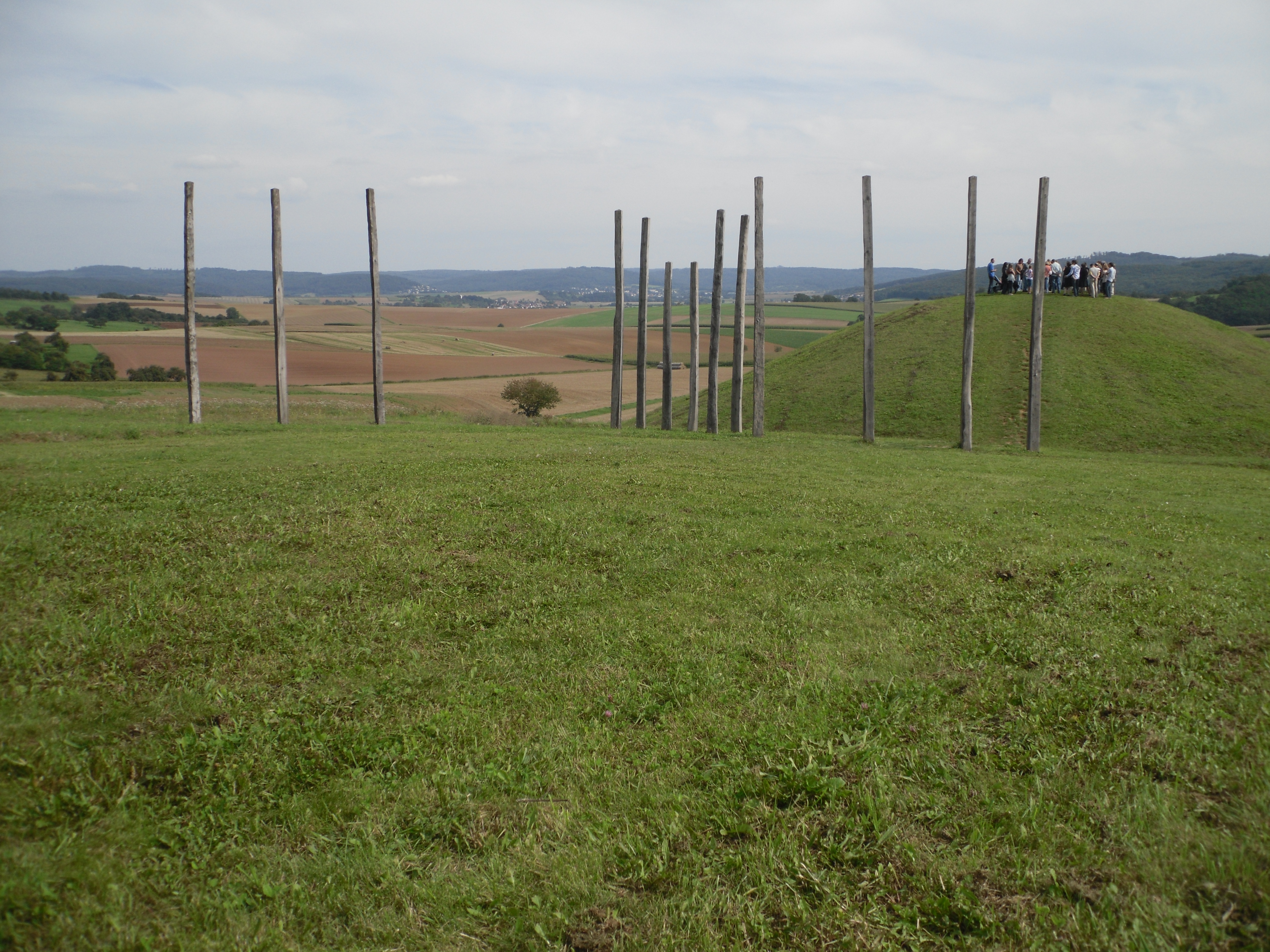 Rekonstruiertes Kalendarium aus 16 Holzpfählen am Glauberg